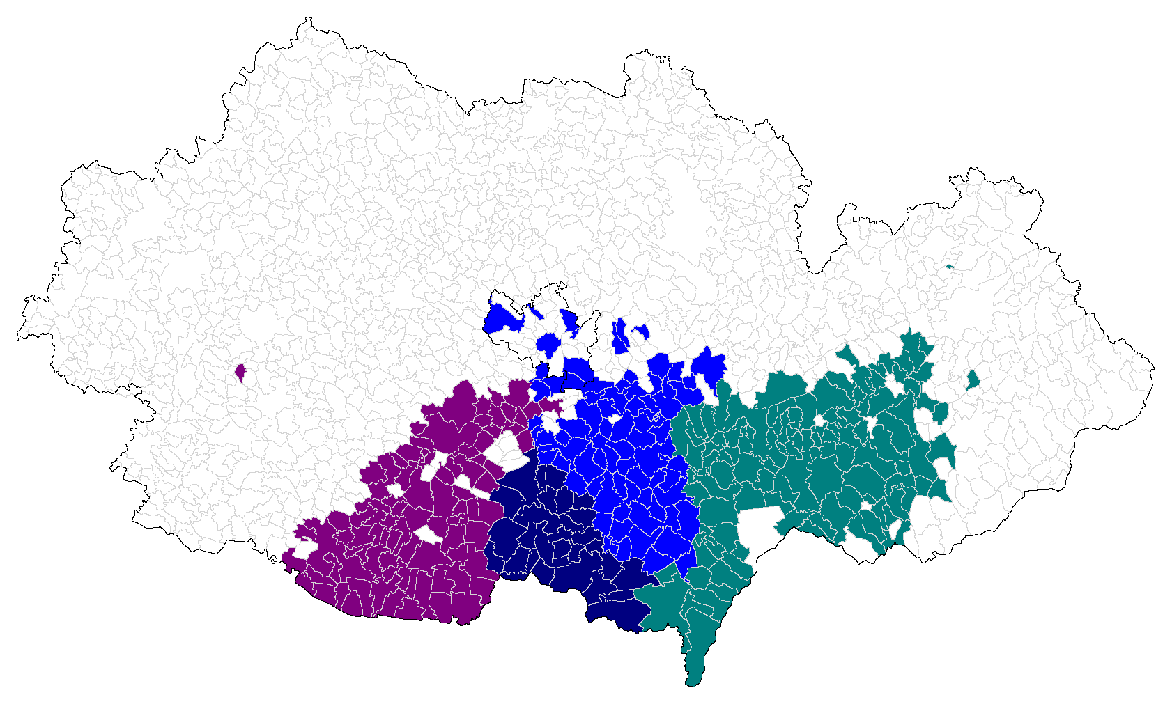 Mapa vinařské oblasti Morava a jejích podoblastí na jižní Moravě (podle § 4 vinařského zákona č. 321/2004 Sb. a její prováděcí vyhlášky č. 254/2010 Sb. se vinařské oblasti skládají z podoblastí, které jsou tvořeny obcemi, v Brně městskými částmi, na jejichž území se nachází viniční tratě).